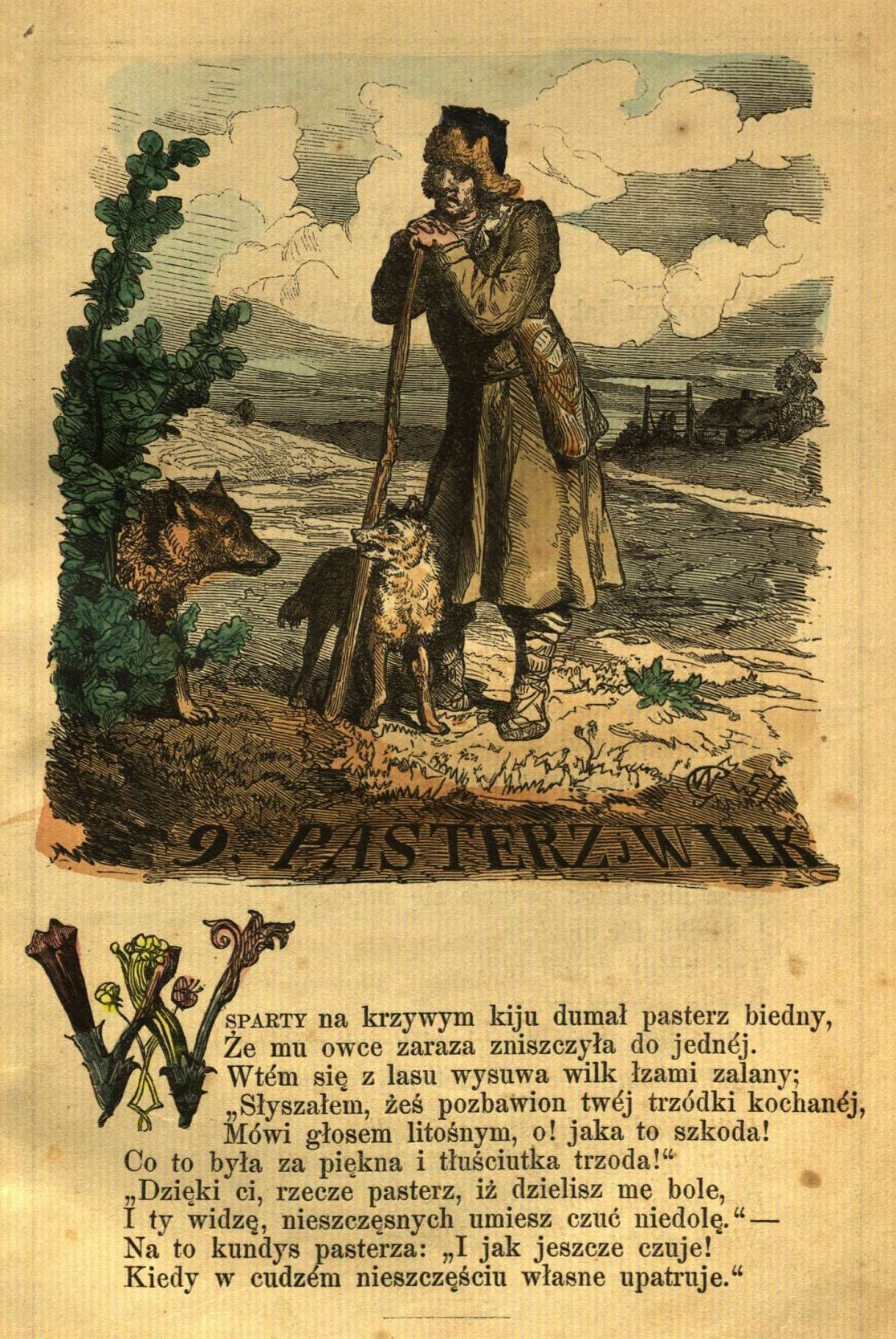 Stanisław Jachowicz, Wojciech Gerson, "Bajki i powiastki Stanisława Jachowicza", Warszawa 1860